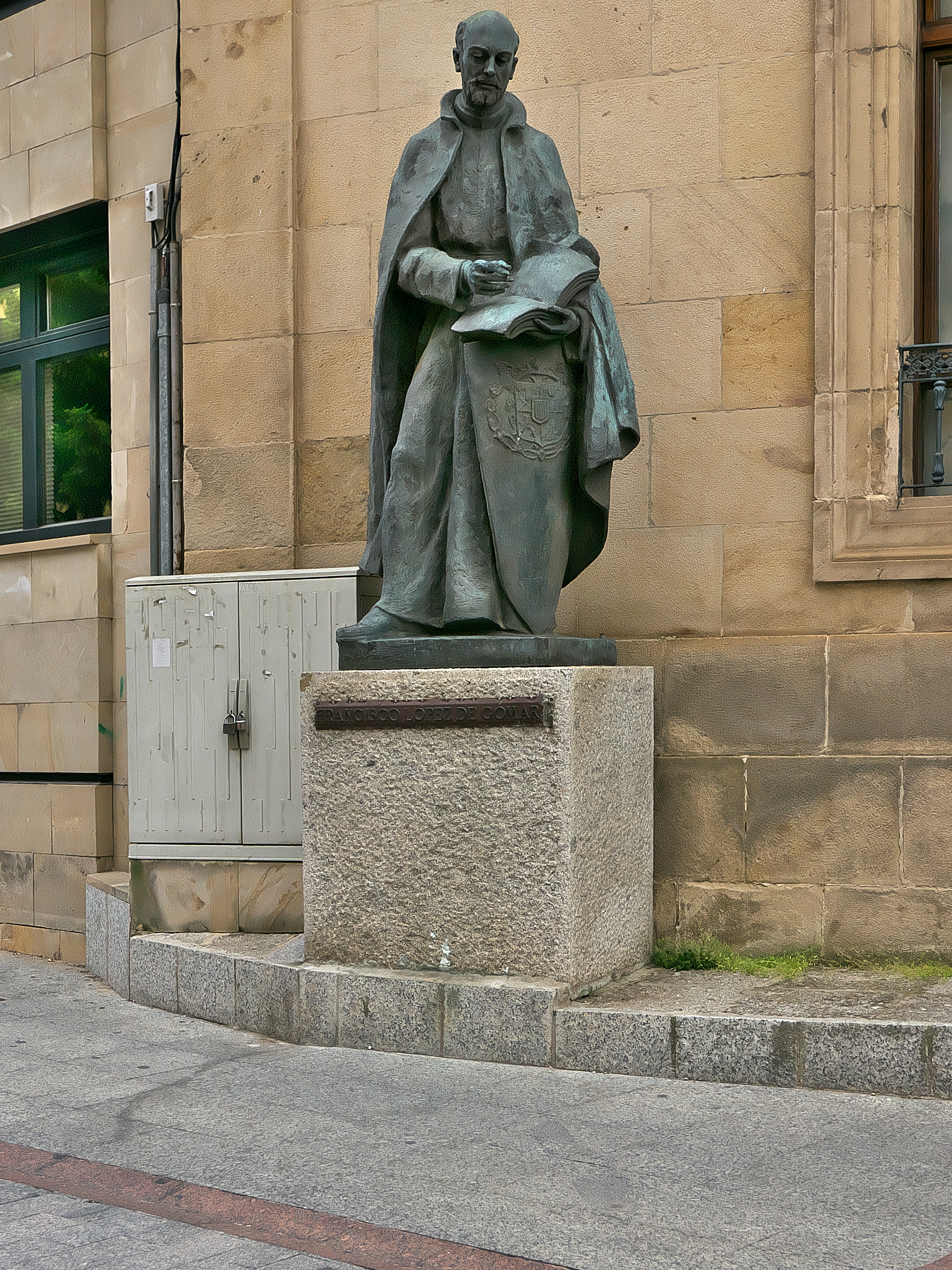 Palacio de los Marqueses de Vadillo. Federico Coullaut-Valera esculpe la figura de Francisco López de Gómara (Gómara, 1511-Sevilla, 1566) autor de la Historia de Méjico.